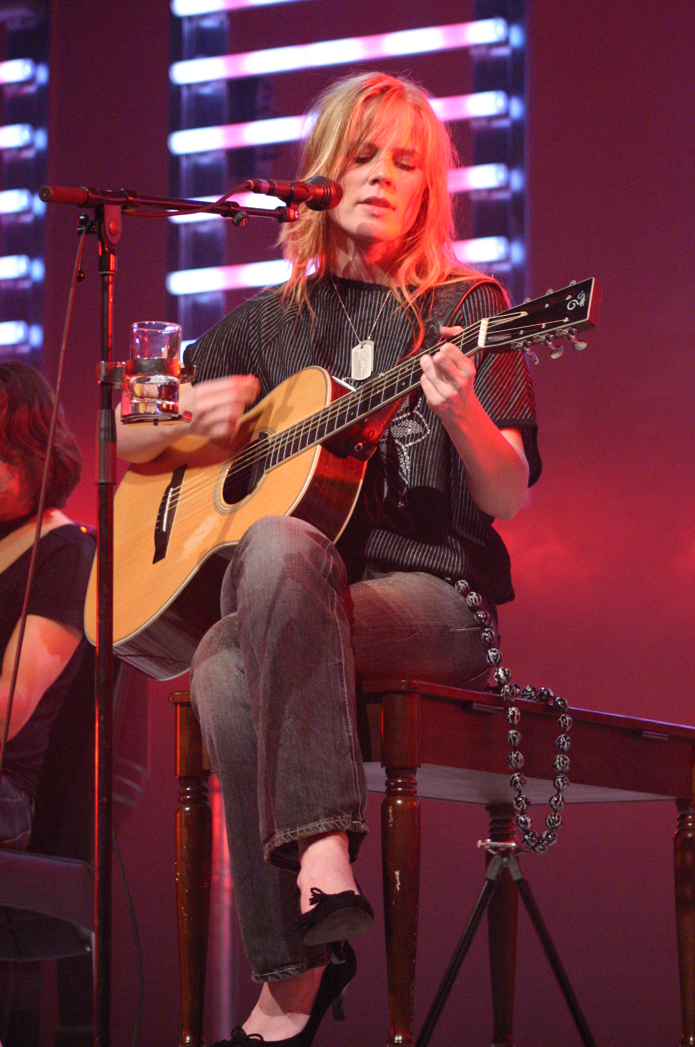 Ilse Delange tijdens de fanmeet 2005 in Cuijk